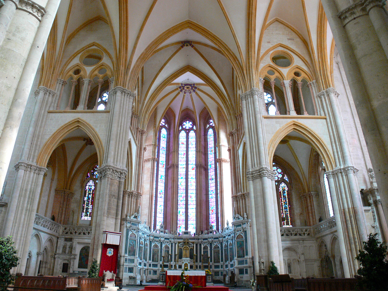 Vue sur le chœur de la cathédrale de Toul (première moitié du XIII° siècle) et ses chapelles attenantes.